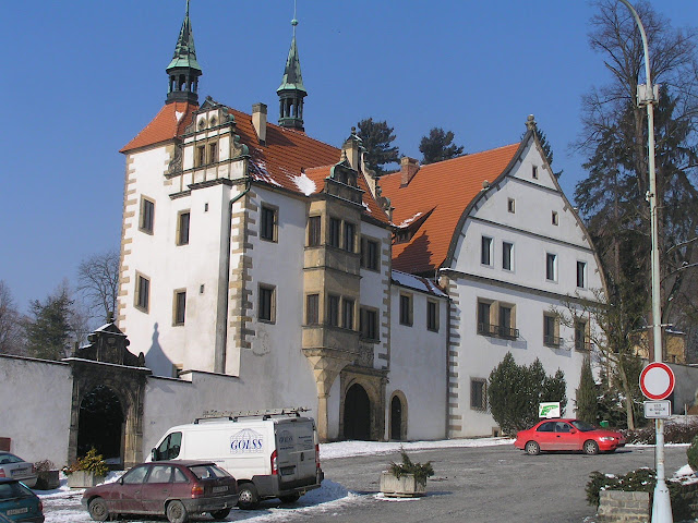 Zámek Horní a Dolní Benešov nad Ploučnicí, Zámecká, nám. Míru 47, Benešov nad Ploučnicí